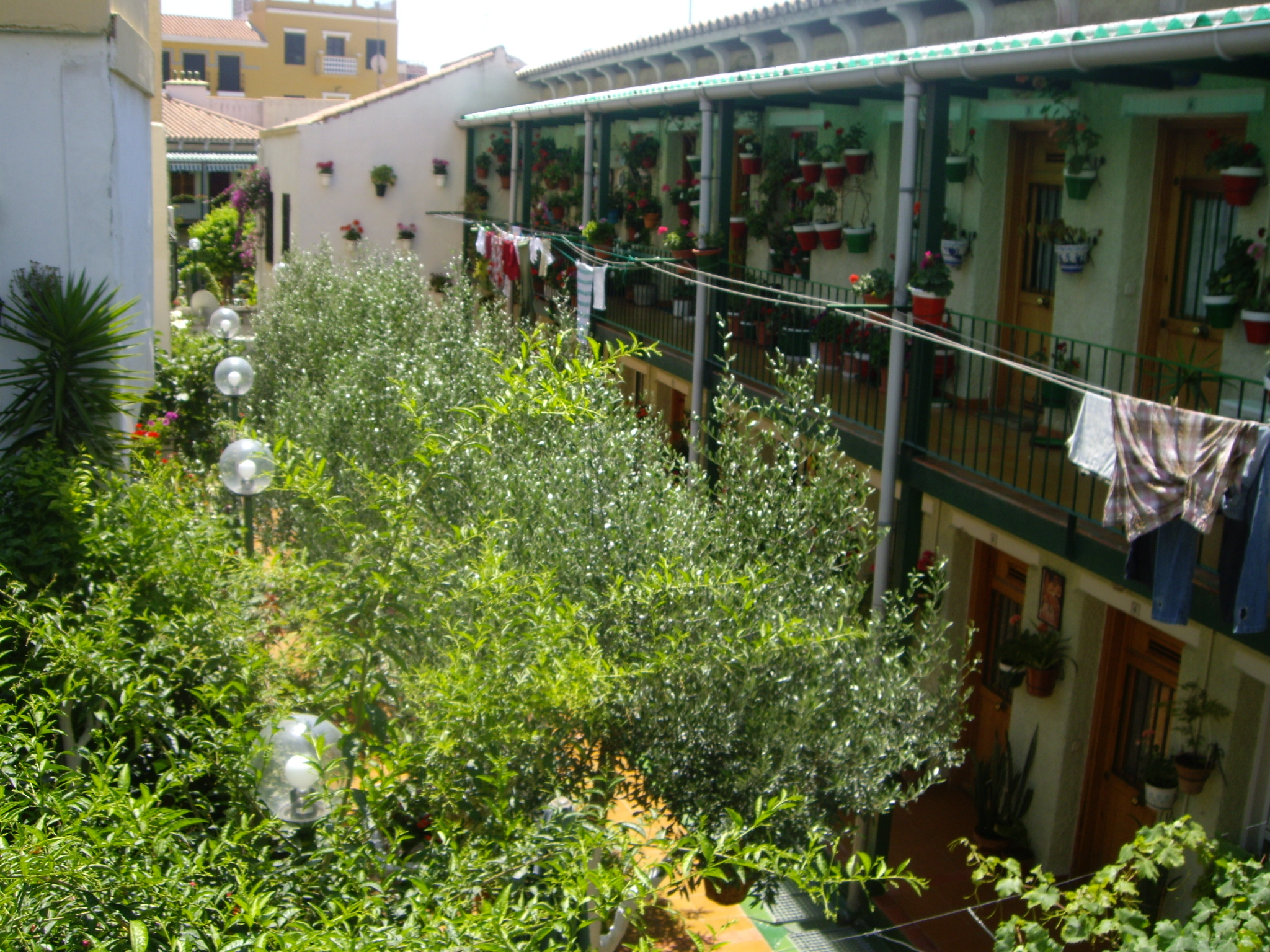 Imagen de un colorido patio de corralón del barrio de La Trinidad, Málaga, España